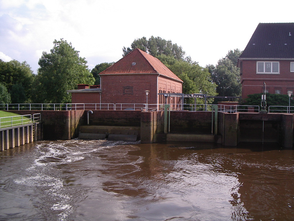 Das Otterndorfer Schöpfwerk von 1929. Ausgestattet mit der damals größten Kreiselpumpe Europas. Foto Benutzer:Geoz. 2005